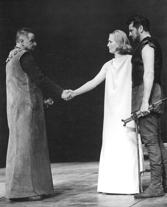 Zentralbild-Hochneder 2.10.1963 VII. Berliner Festtage 1963 - Iphigenie auf Tauris. Am 4. Oktober 1963 findet im Deutschen Theater die Premiere von "Iphigenie auf Tauris" von Johann Wolfgang von Goethe unter der Regie von Wolfgang Langhoff statt. UBz. Szenenbild mit Wolfgang Langhoff als Thoas (links), Inge Keller als Iphigenie und Horst Drinda als Orest.